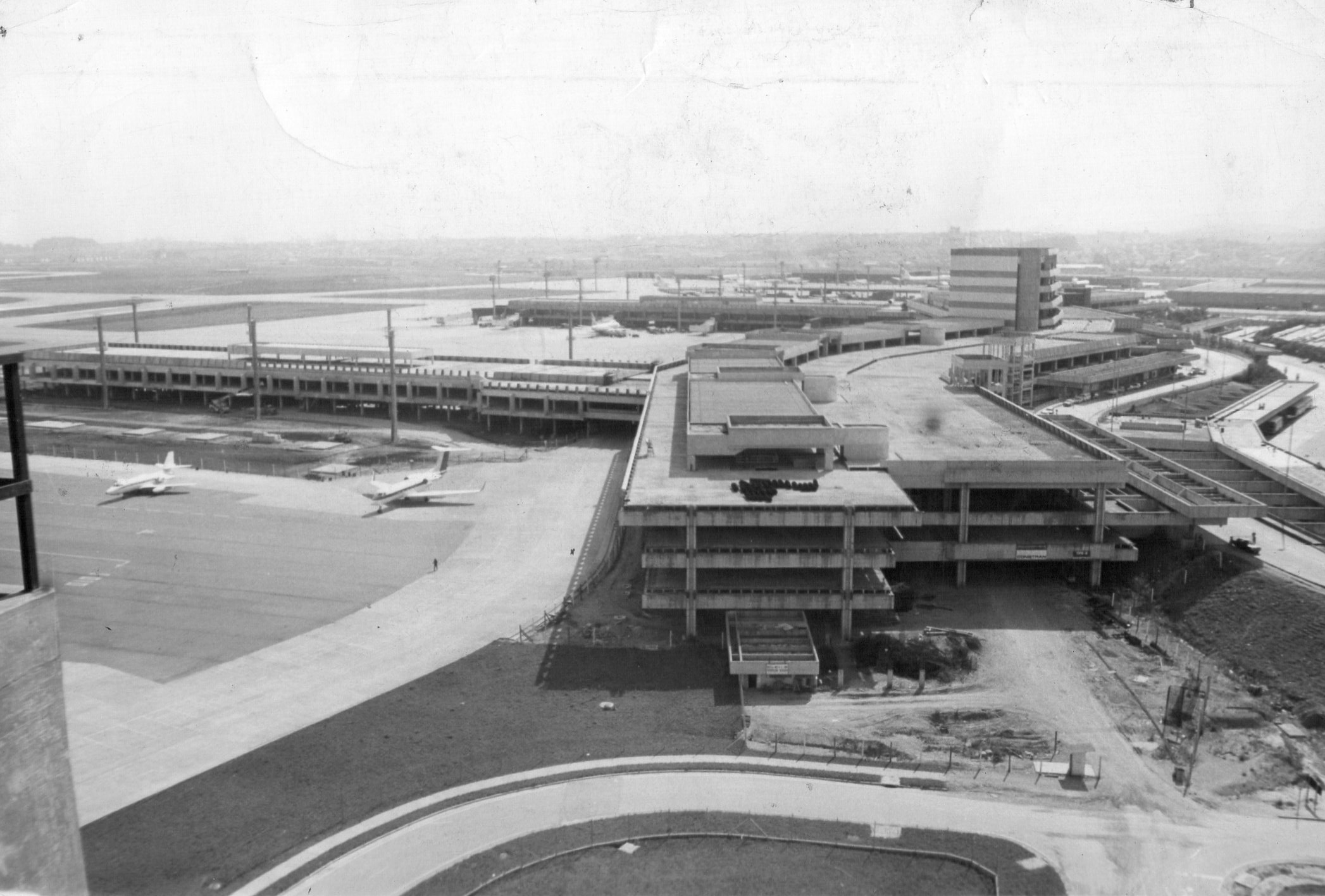 Aeroporto Internacional de Guarulhos